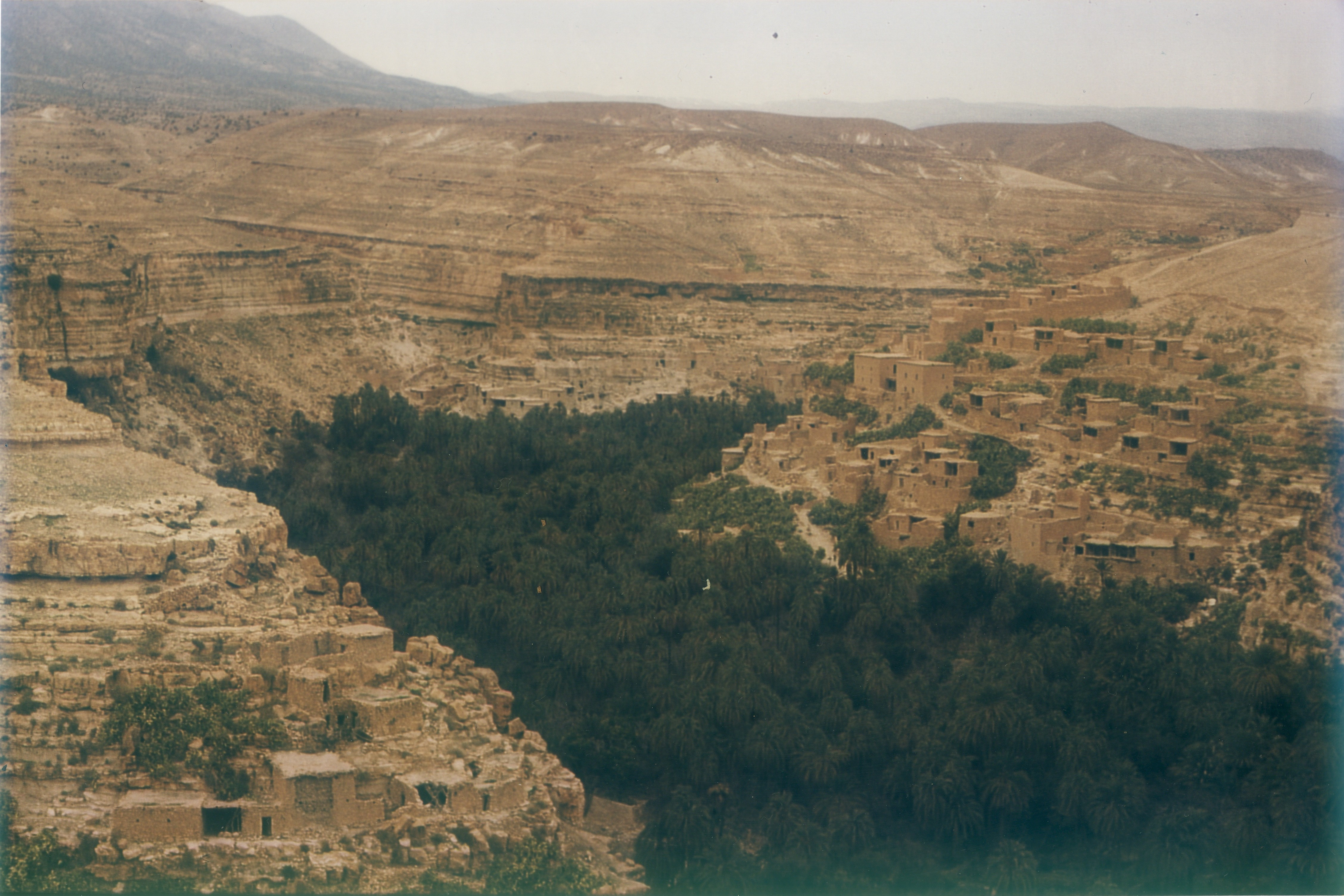 In Schichtkalken der südlichen Atlas-Abdachung eingesenkte Flussoase bei Biskra (Algerien). Das Bild diente zur Abnahme des in der Frankfurter 5. Klasse verwendeten Talprofils; Bild aus dem auf Martin Wagenschein basierenden Lehrstücks "Wettersteine" (1997)